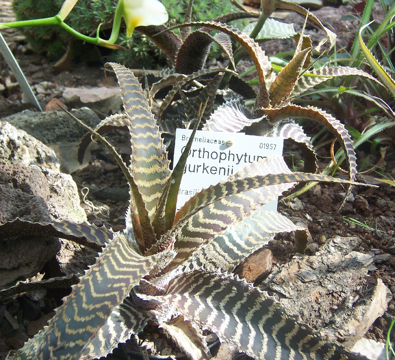 Orthophytum gurkenii, habitus